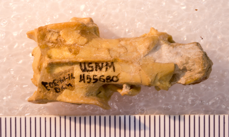 Apternodus iliffensis Galbreath